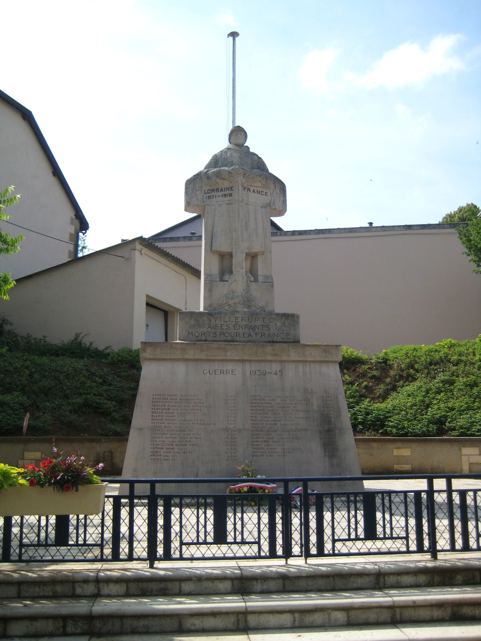 Description Monument aux Morts de Villerupt Date26 June 2009Sourcemon appareil photoAuthorAimelaime Monument aux Morts de Villerupt